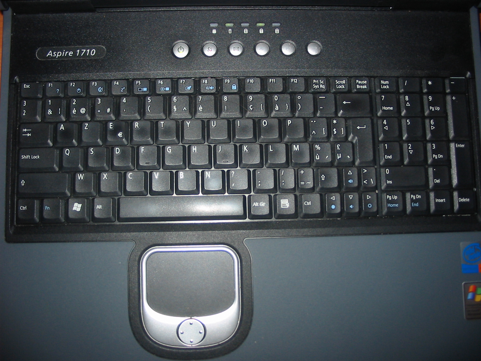 AZERTY keyboard layout